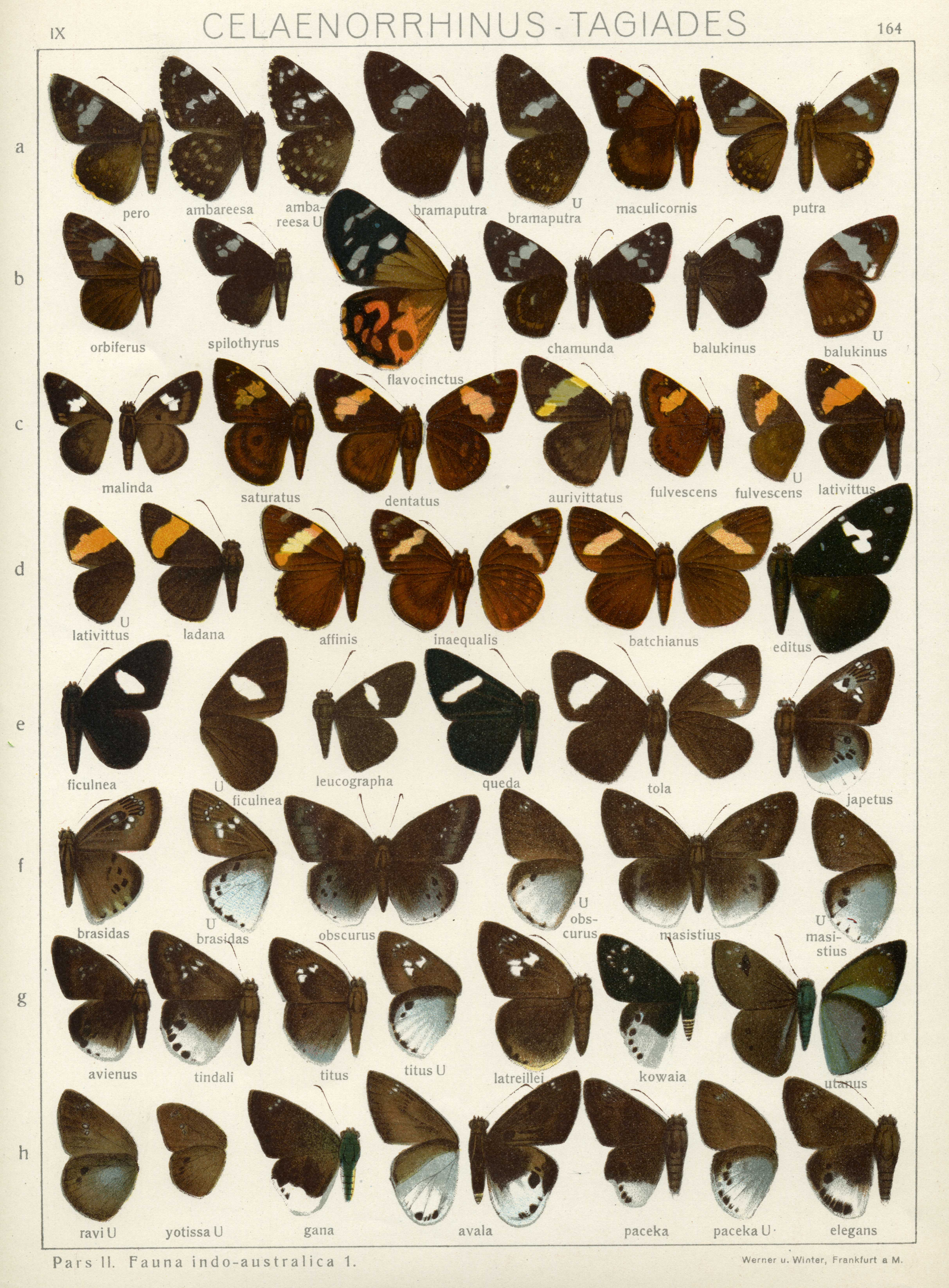 Adalbert Seitz Ed. Die Großschmetterlinge der Erde Band 9: Abt. 2, Die exotischen Großschmetterlinge, Die indo-australischen Tagfalter, [1927] text , 1197 Seiten 177 Tafeln Verlag Alfred Kernen, Stuttgart See The Global Lepidoptera Names Index for valid names